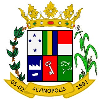 Brasão do Município de Alvinópolis - MG - BR